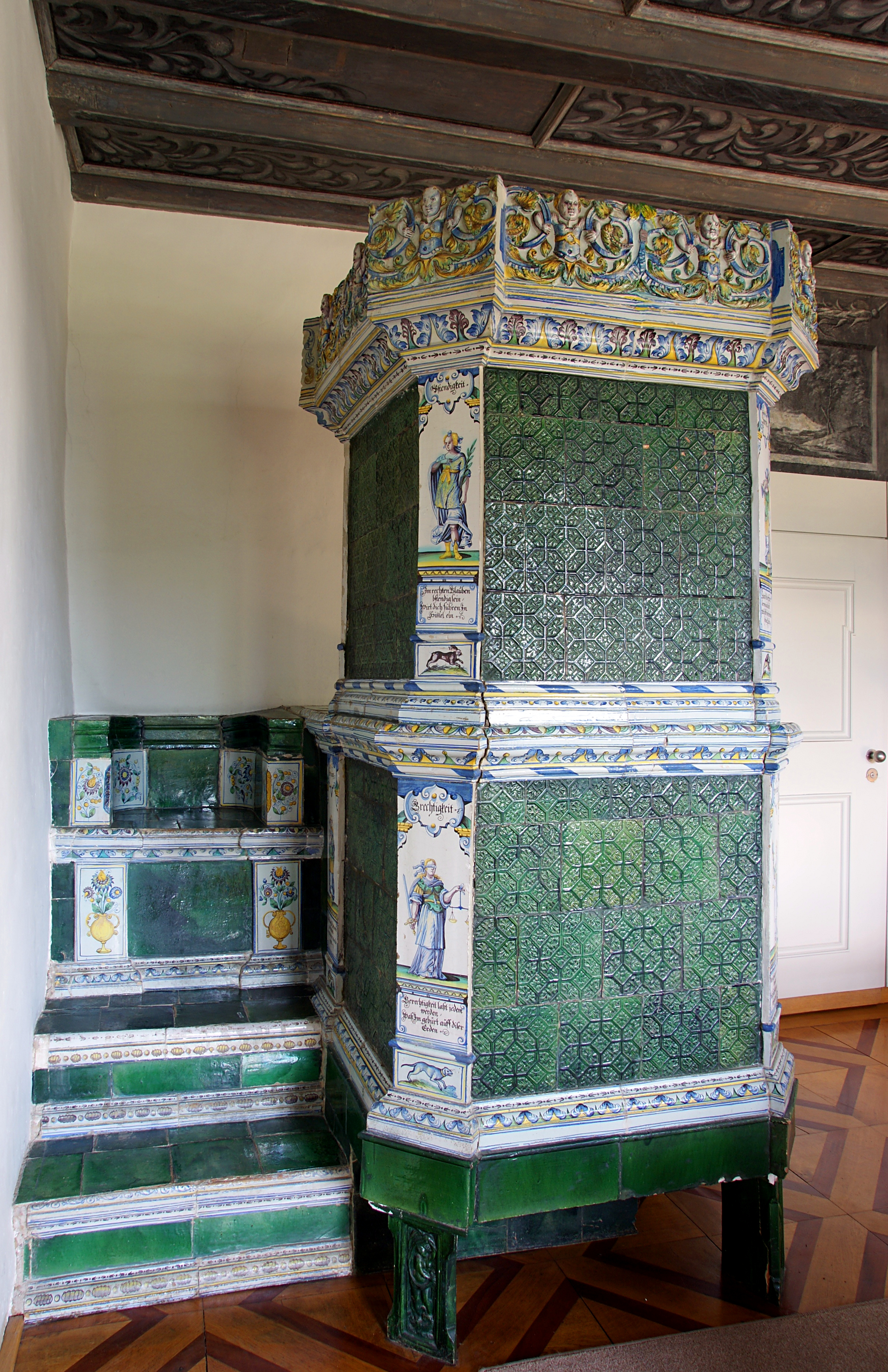 Fayence-Ofen der Werkstatt Pfau in Winterthur im Ecksalon von Schloss Löwenberg.